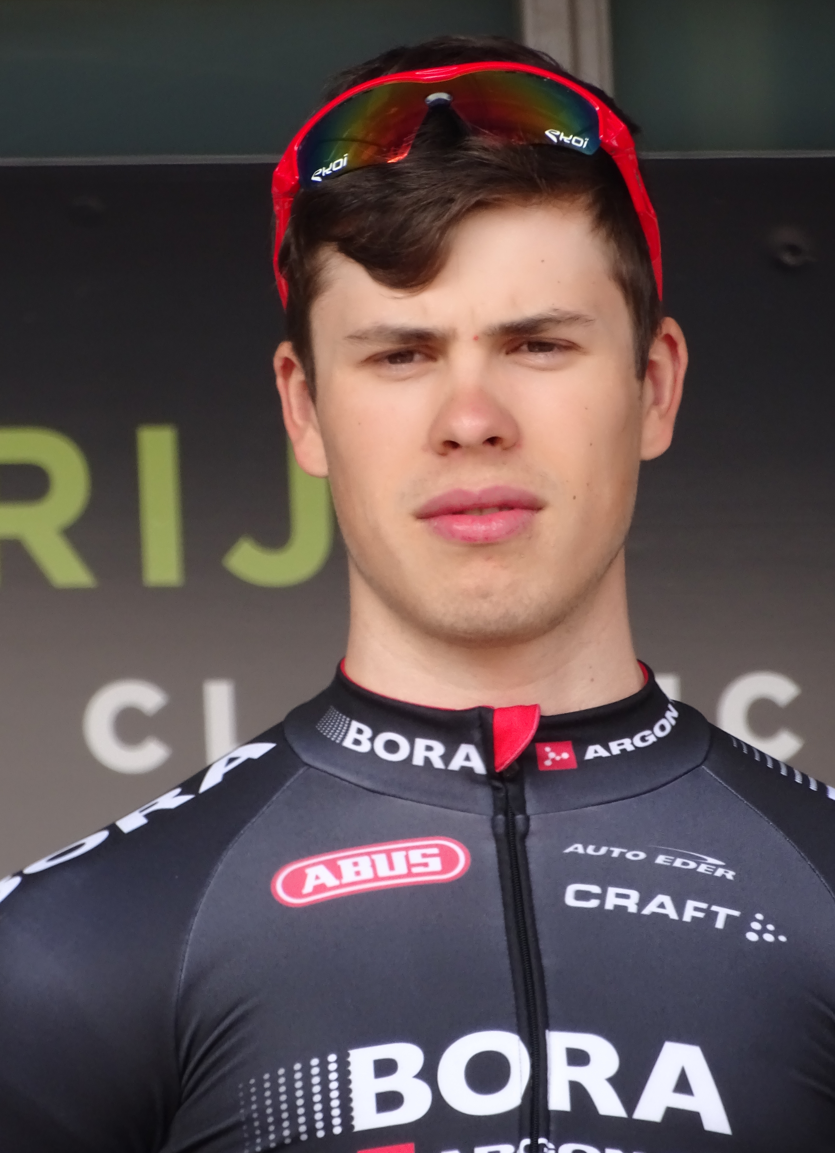 Reportage réalisé le mercredi 8 avril à l'occasion du départ du Grand Prix de l'Escaut 2015 à Anvers, Belgique.